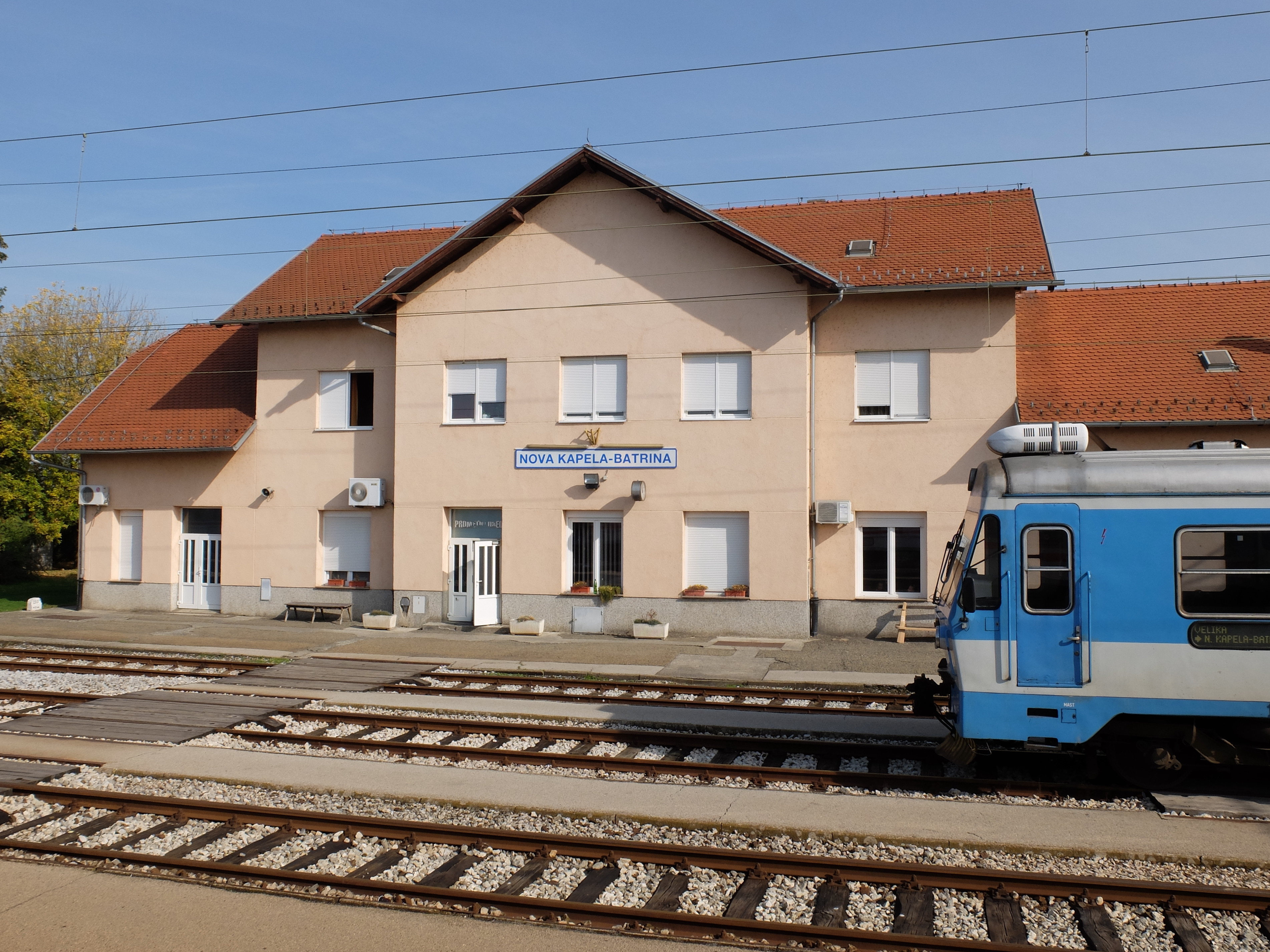 Bahnhof von Nova Kapela-Batrina